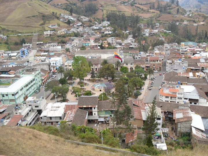 S.J Chimbo